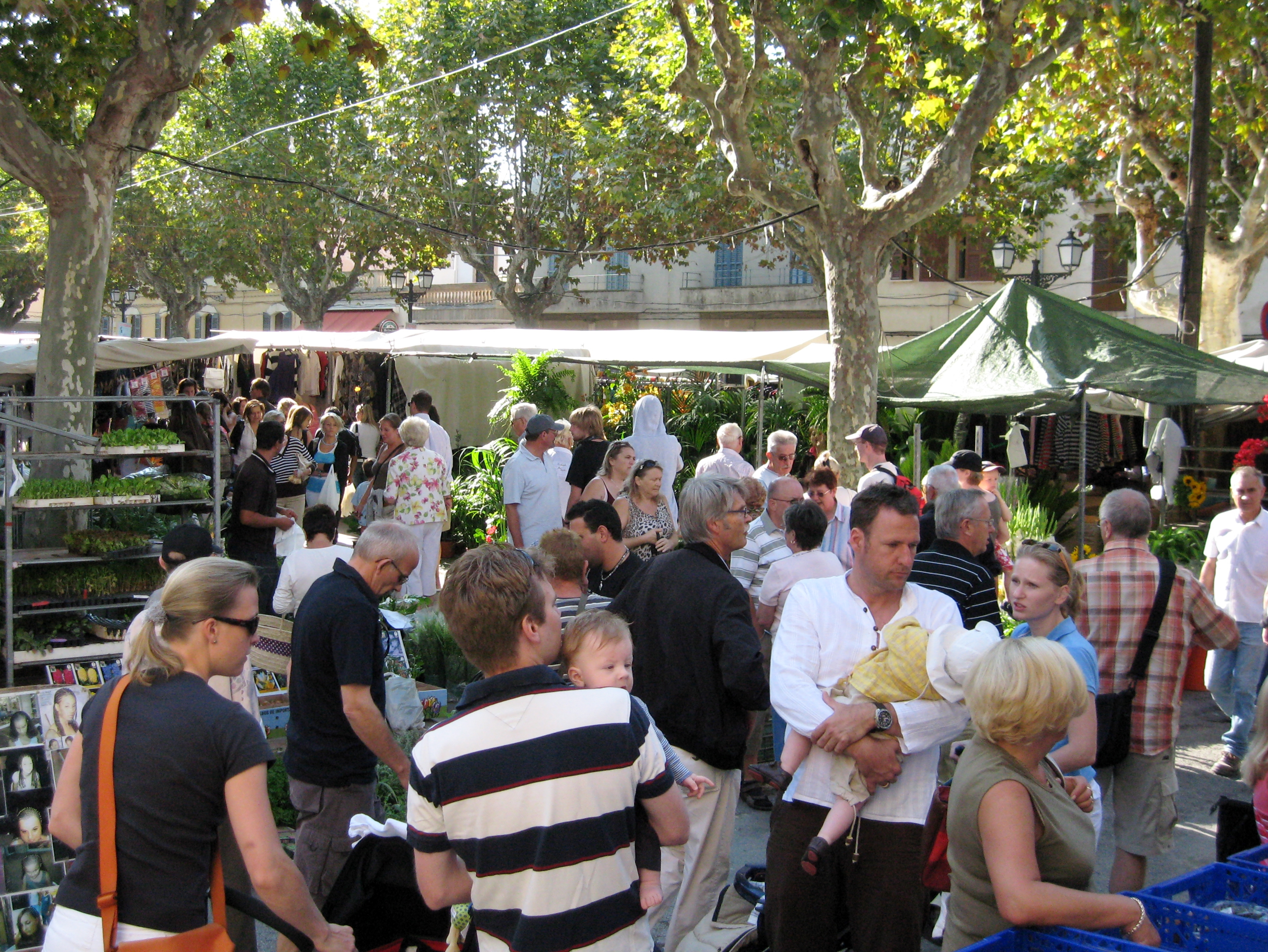 Markttag auf der Plaça Conqueridor in Artà, Mallorca, Spanien